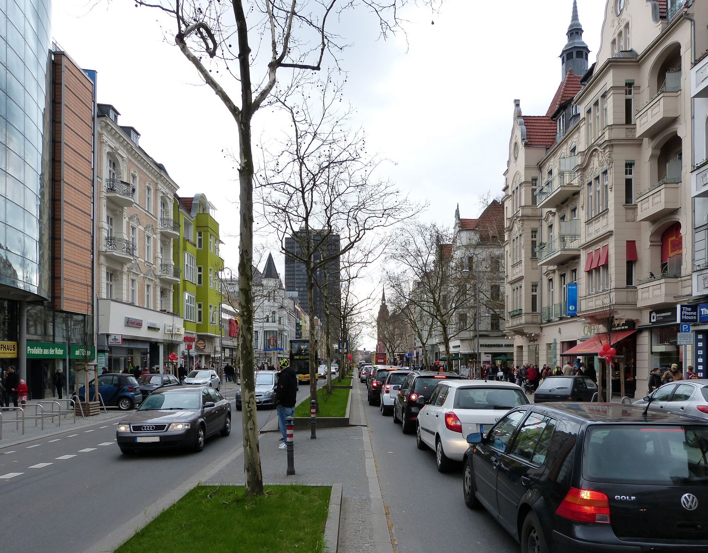 Berlin-Steglitz, Schloßstraße, verkaufsoffener Sonntag